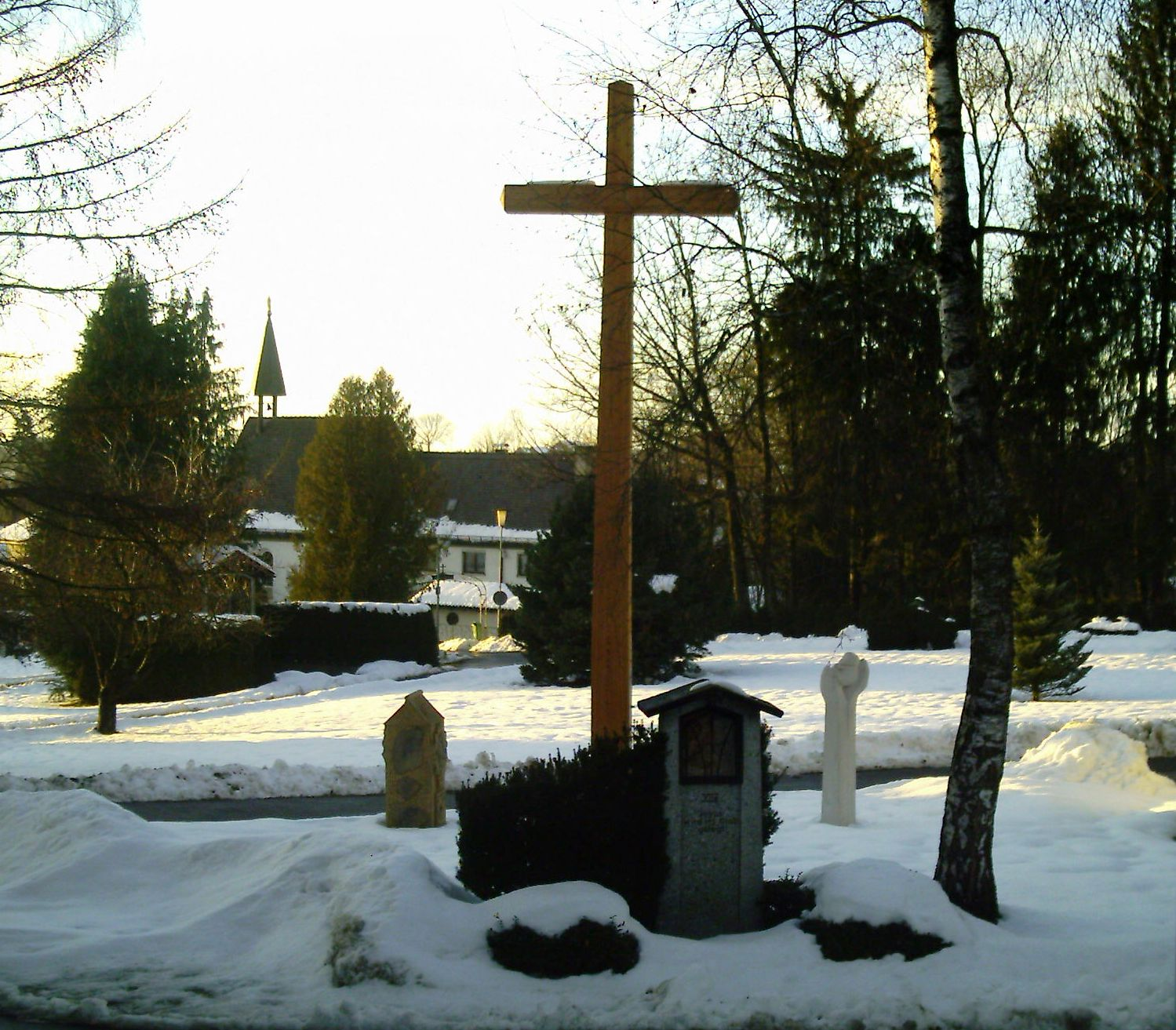 Gebetsstätte in Wigratzbad (Diözese Augsburg, Landkreis Lindau)